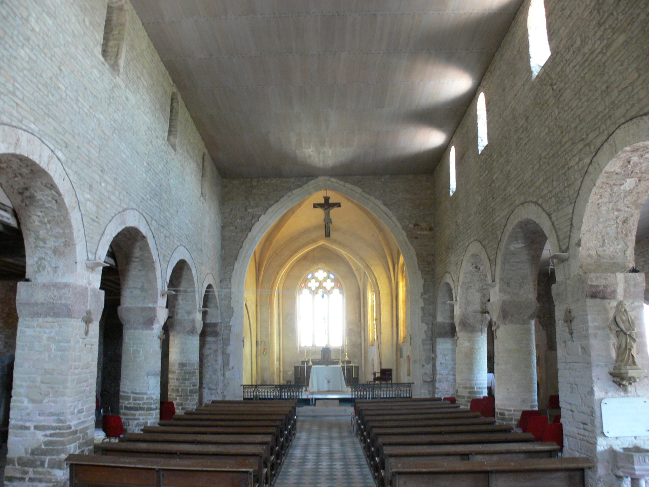 Nef du Prieuré bénédictin de Froville-la-romane, Lorraine, France